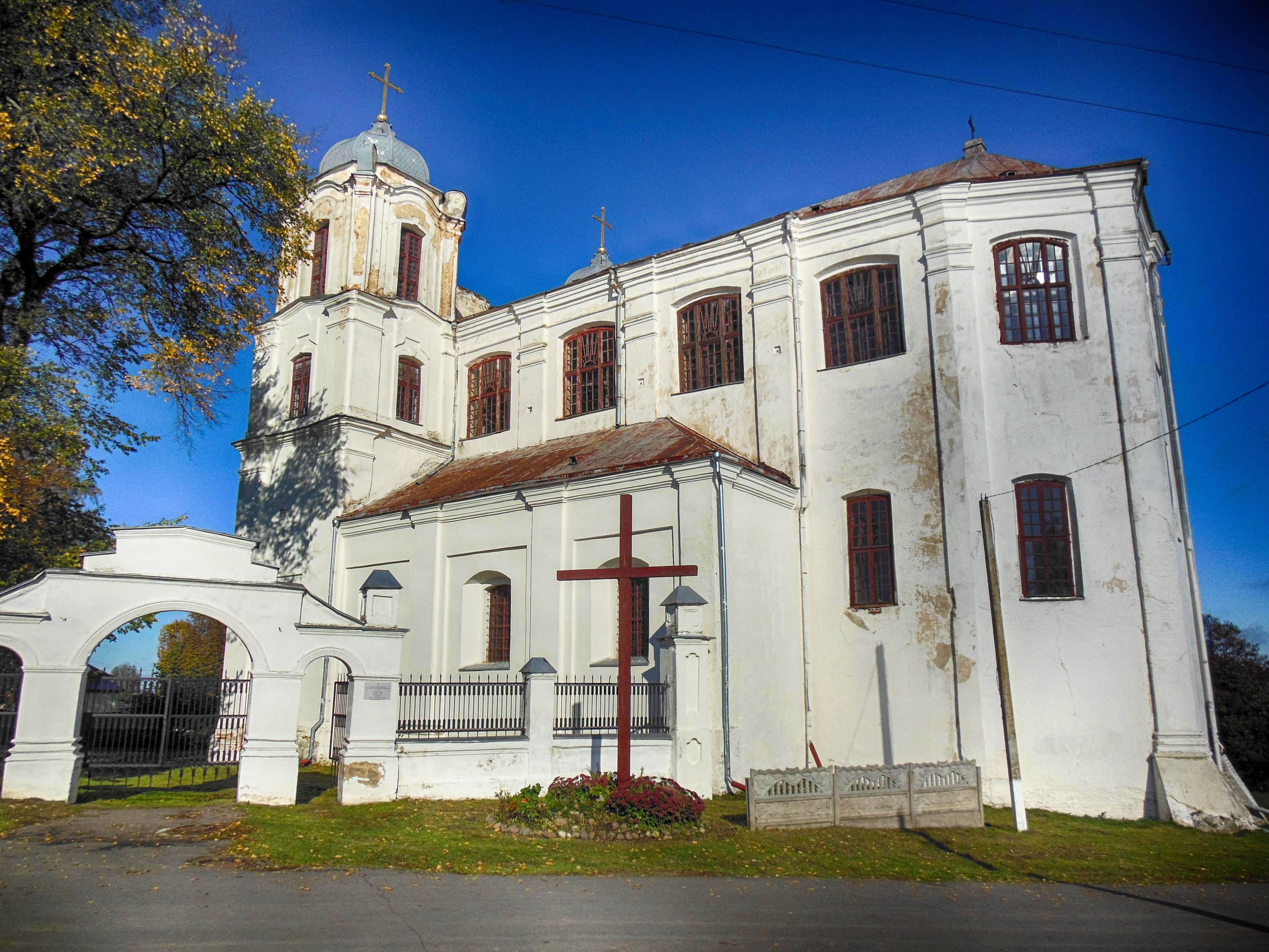 Беларуская (тарашкевіца): Успенскі касцёл з фрэскамі ў інтэр’еры брама кляштарны корпус. г. Амсьціслаў This is a photo of Belarusian heritage monument. Reference number: 511Г000504 ( WLM)